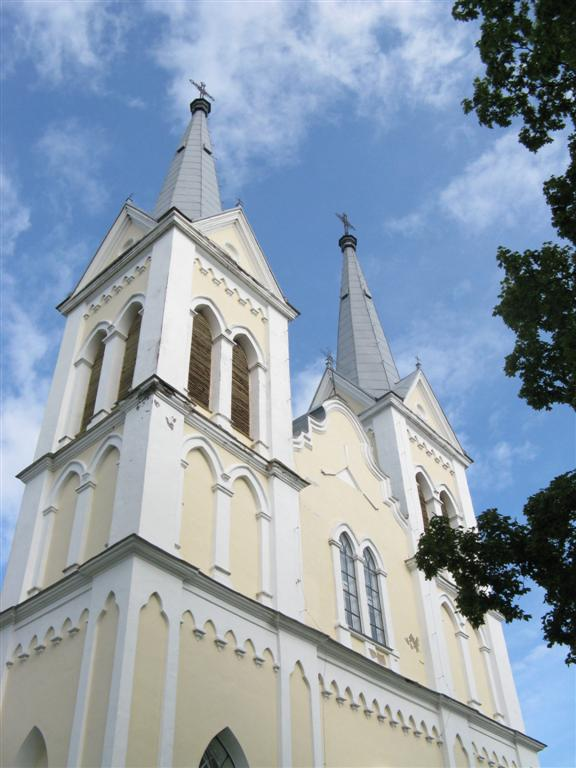 Obelių Šv. Onos bažnyčia